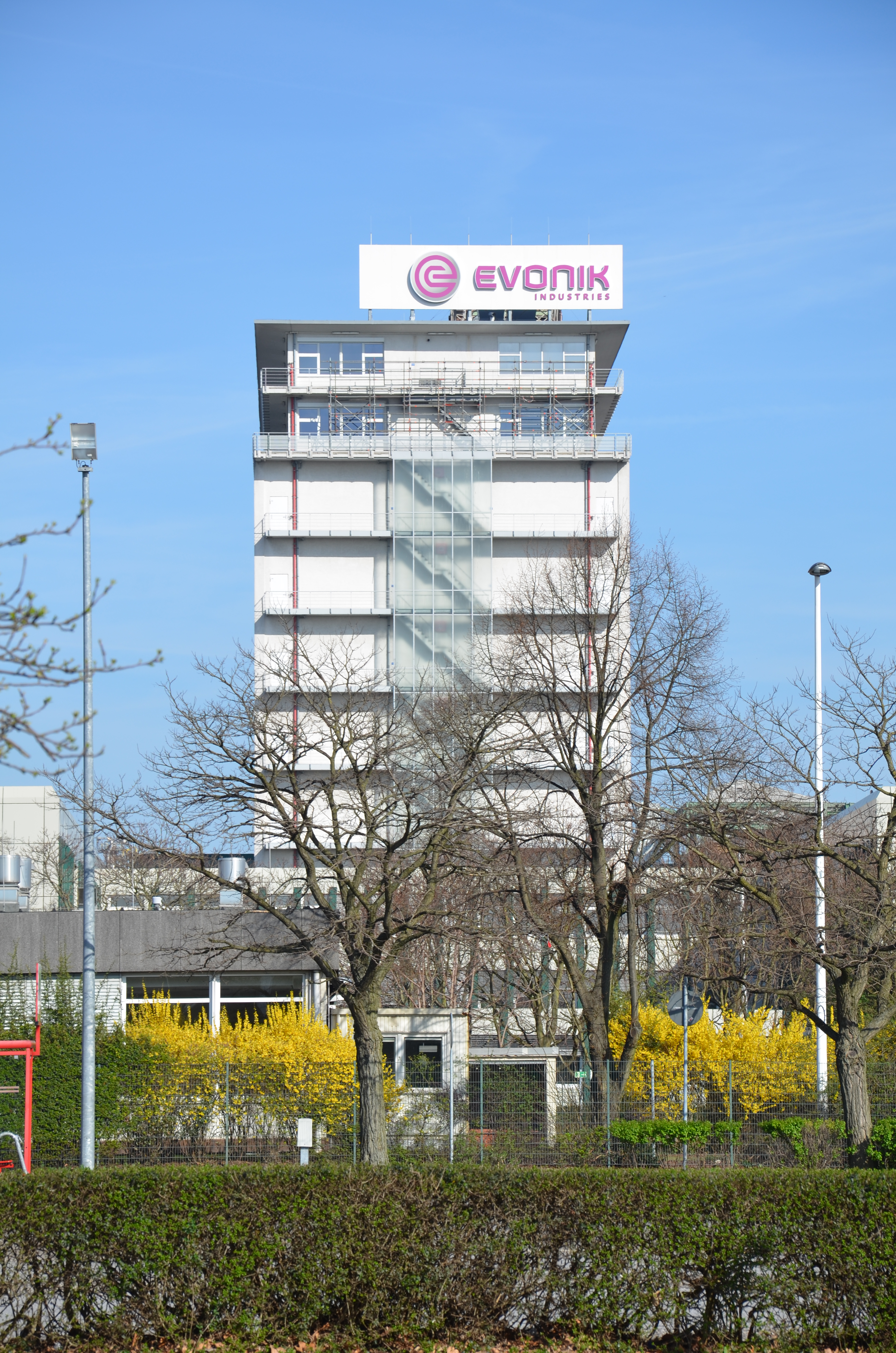 Chemiepark Marl Hochhaus (Bau145) mit Evonik-Schriftzug und Logo auf dem Dach.